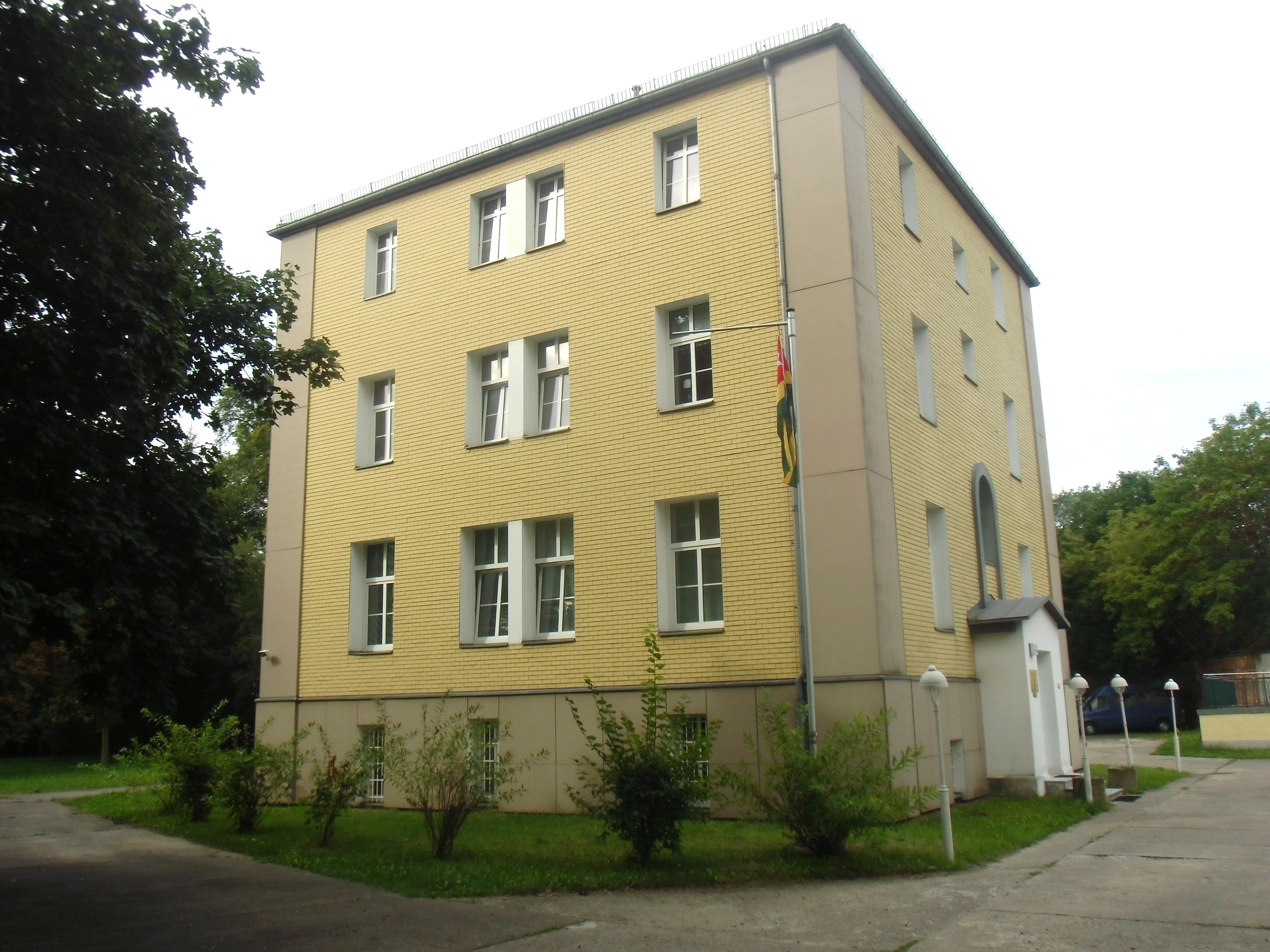 Denkmalgeschütztes ehemaliges Wohnhaus, erbaut um 1870, jetzt Sitz der Botschaft der Republik Togo